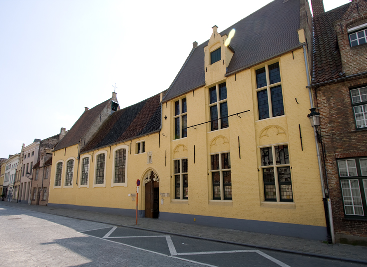 HH. Konstantijn-en-Helenakerk Brugge